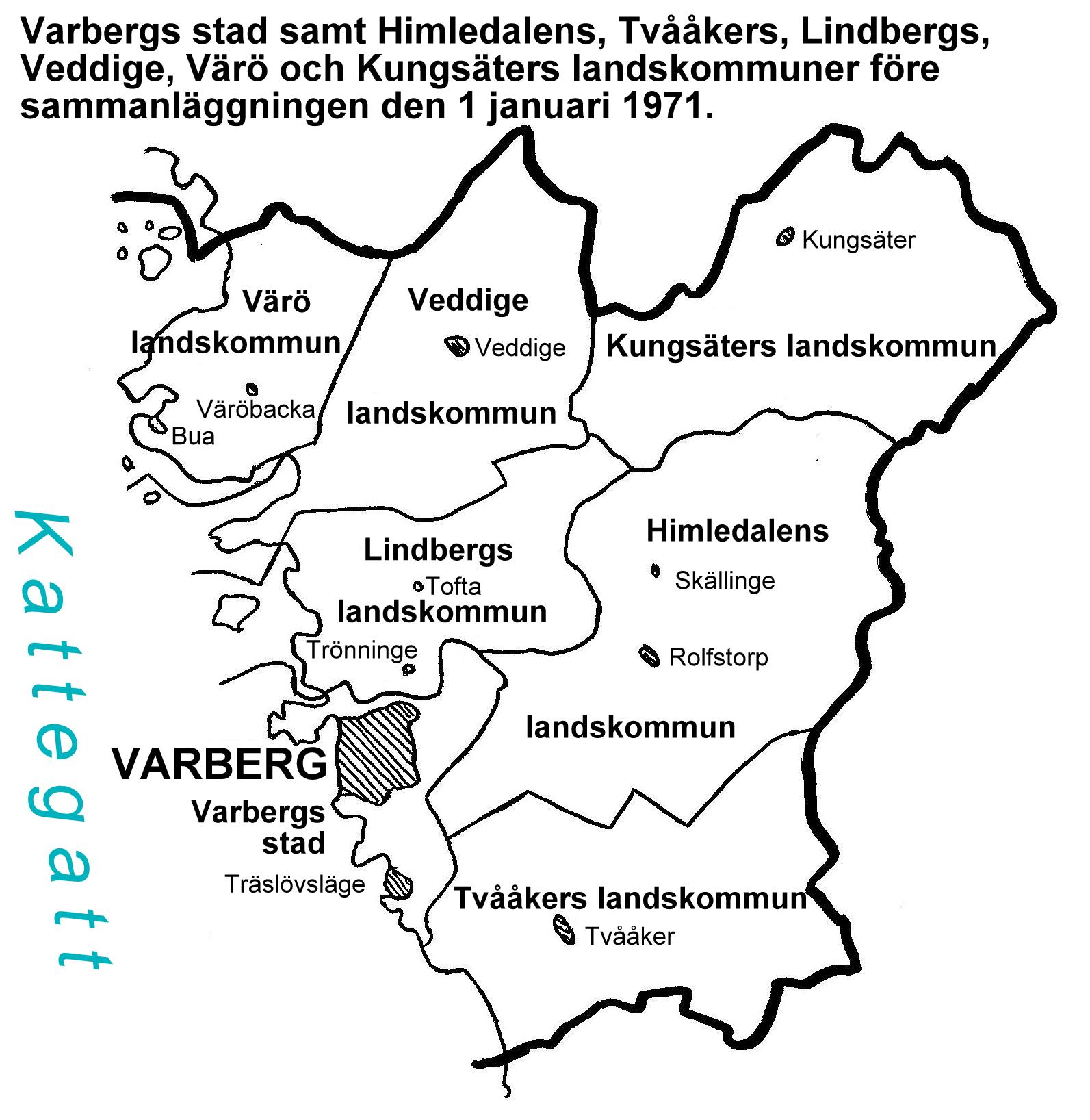 De landskommuner samt Varbergs stad som bildade Varbergs kommun den 1 januari 1971.